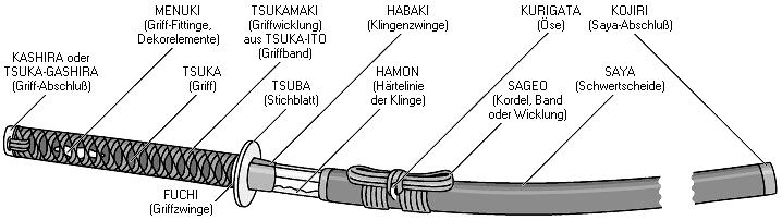 Bestandteile eines japanischen Schwertes und der sog. Koshirae-Montierung